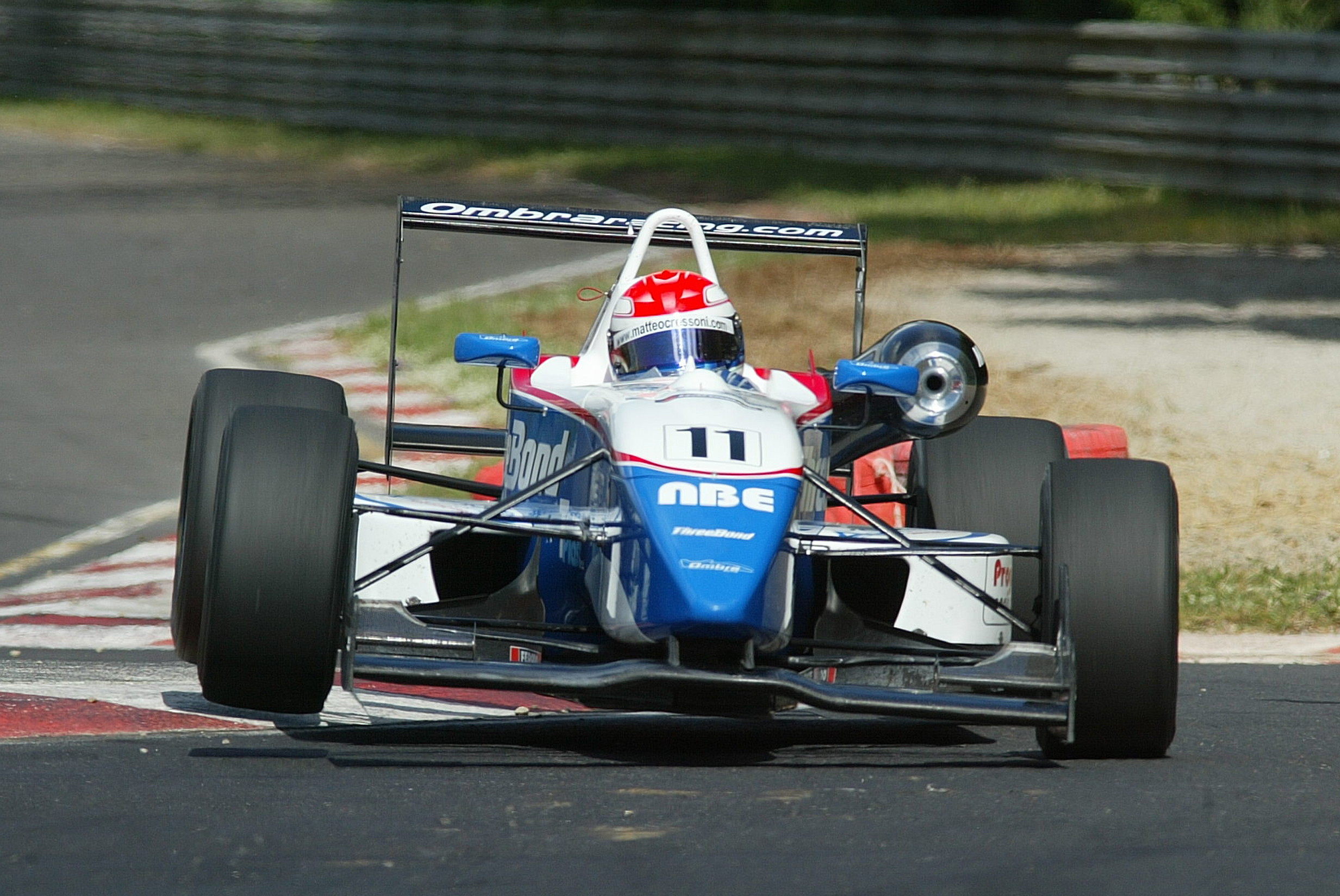 Matteo Cressoni alla guida della Dallara/Mugen nel Campionato Italiano F3 (2004)